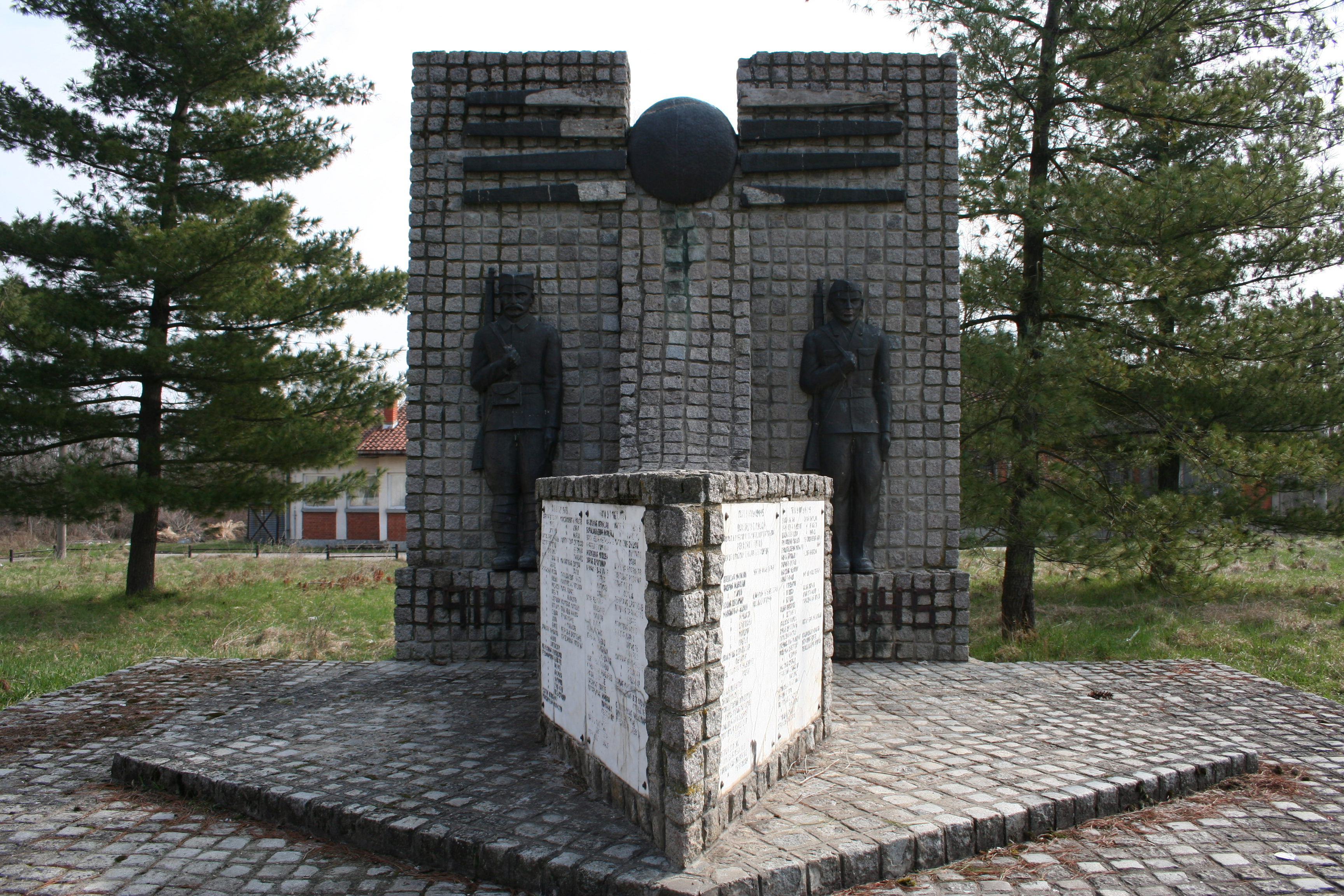 Spomenik u centru sela, Radljevo